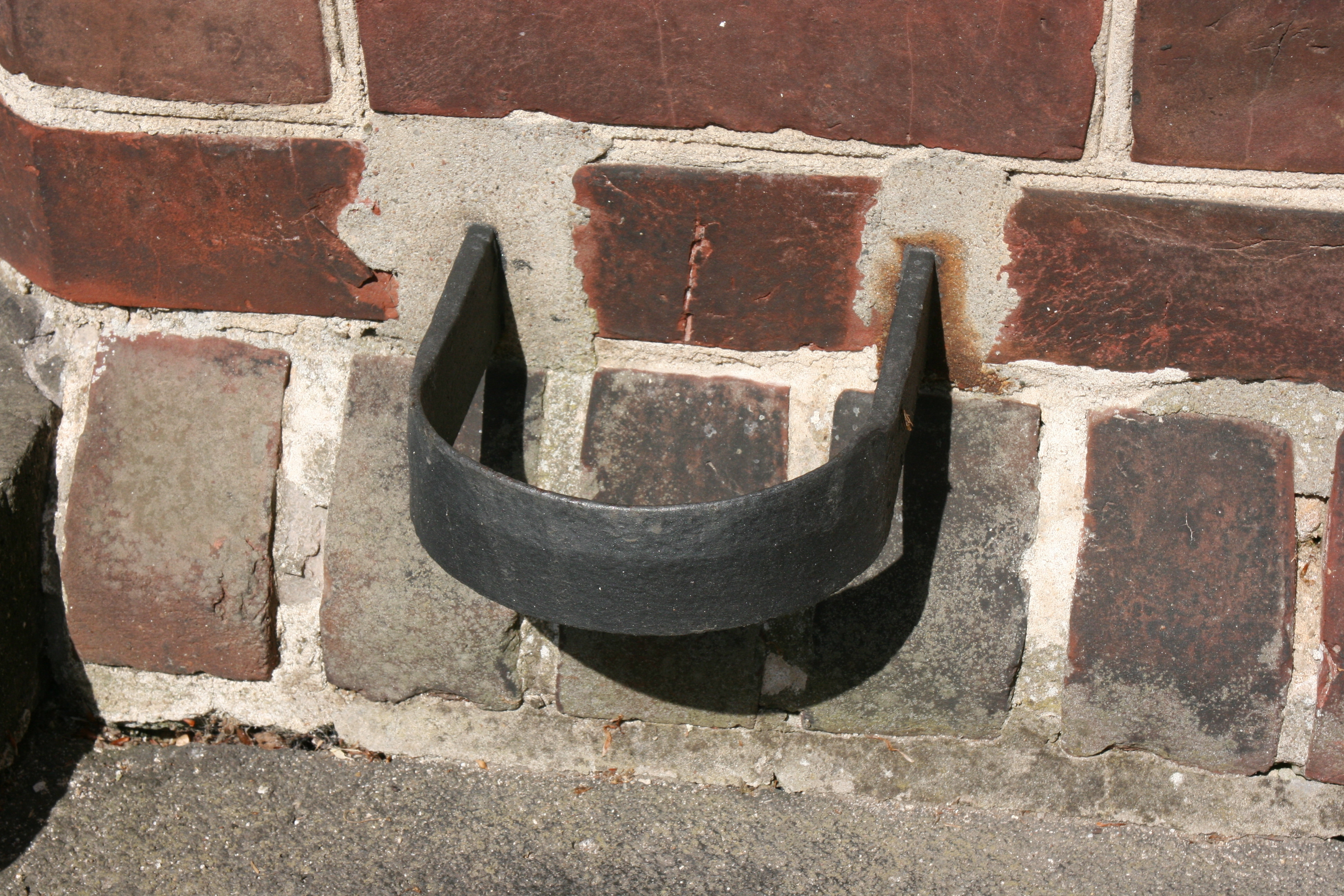 Johanniskirche im Areal der Landesklinik, Johannisstraße in Süchteln, Viersen